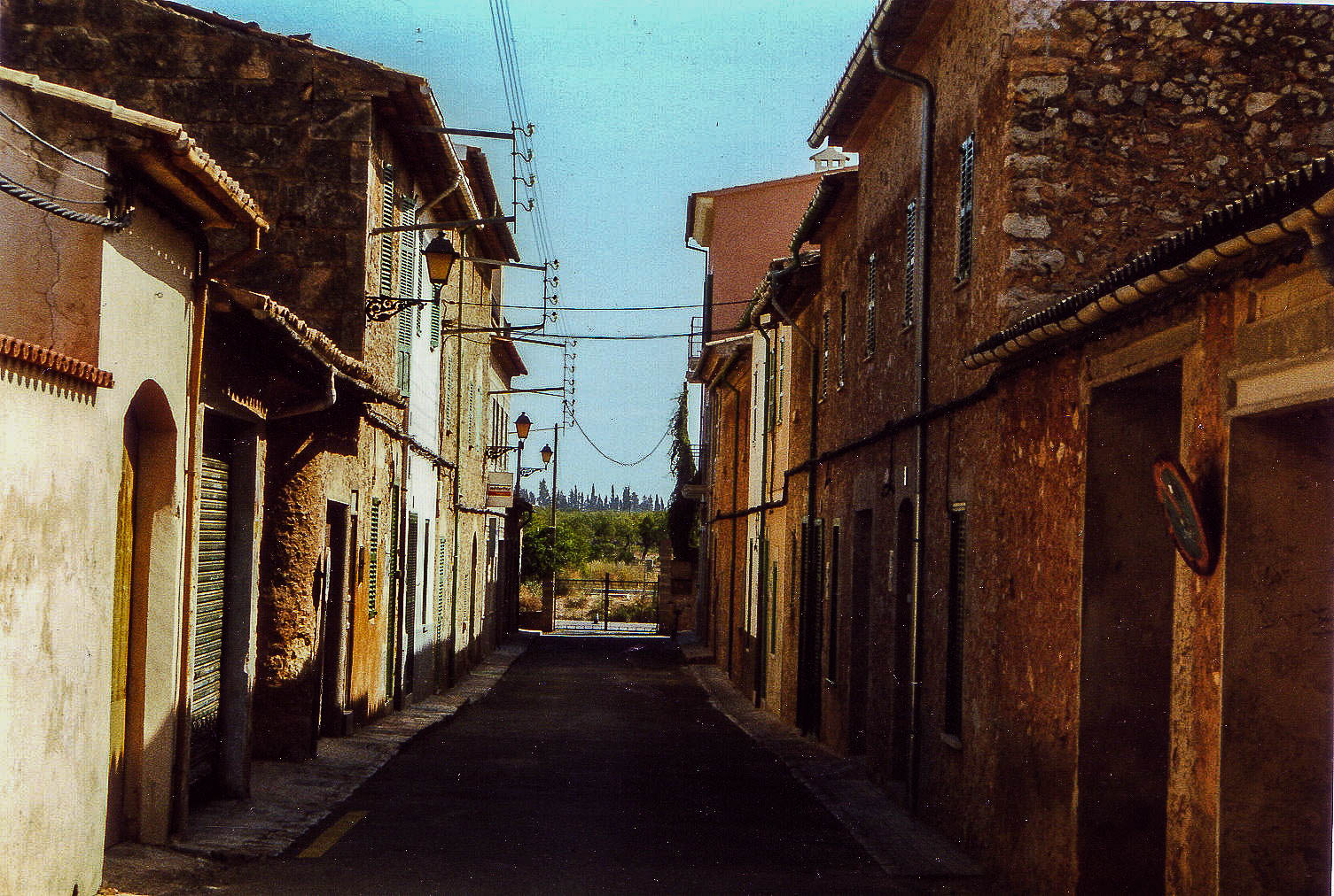 Santa Maria del Camí (2001)